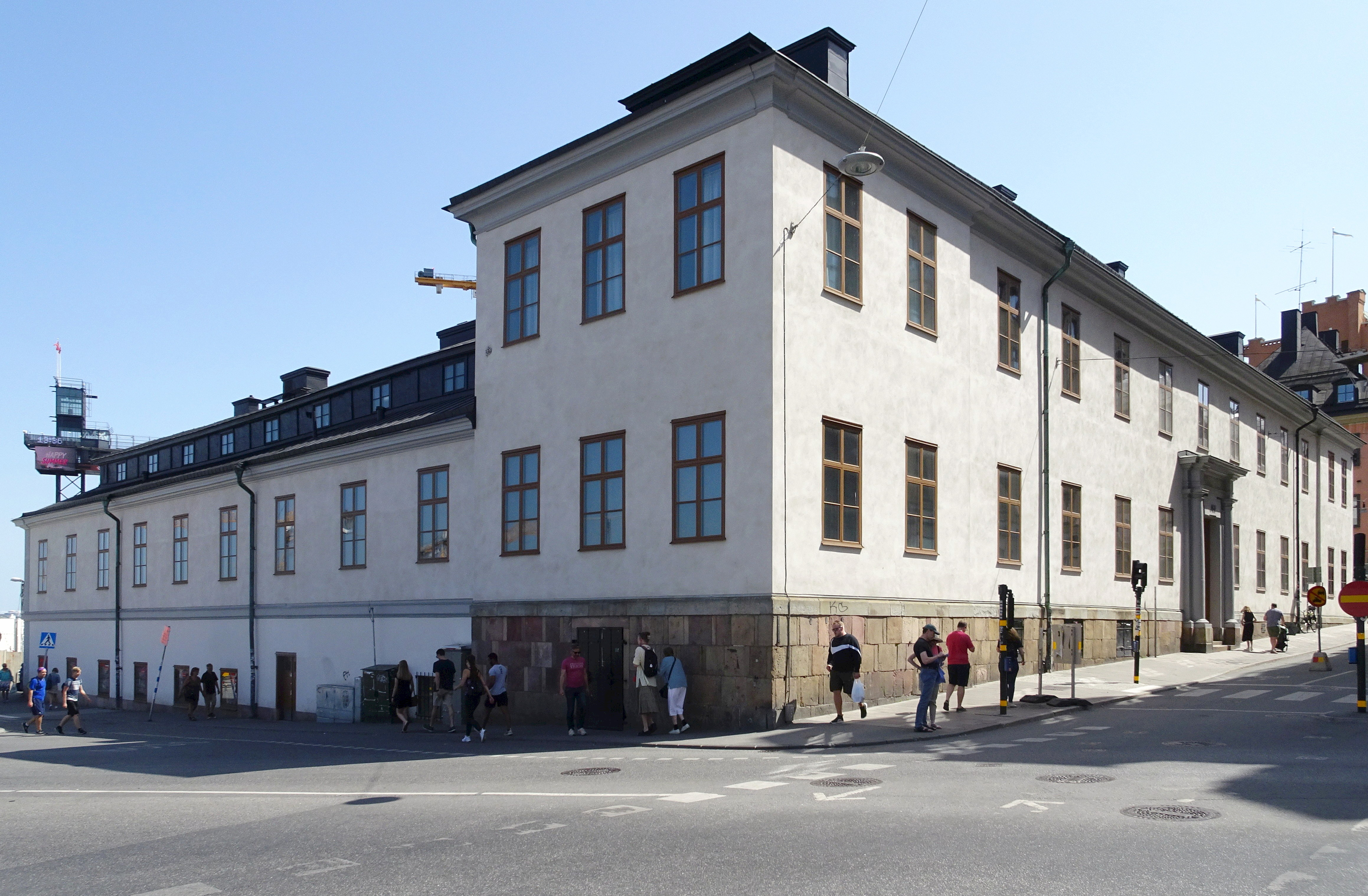 Stadsmuseet i Stockholm, exteriör från Hornsgatan